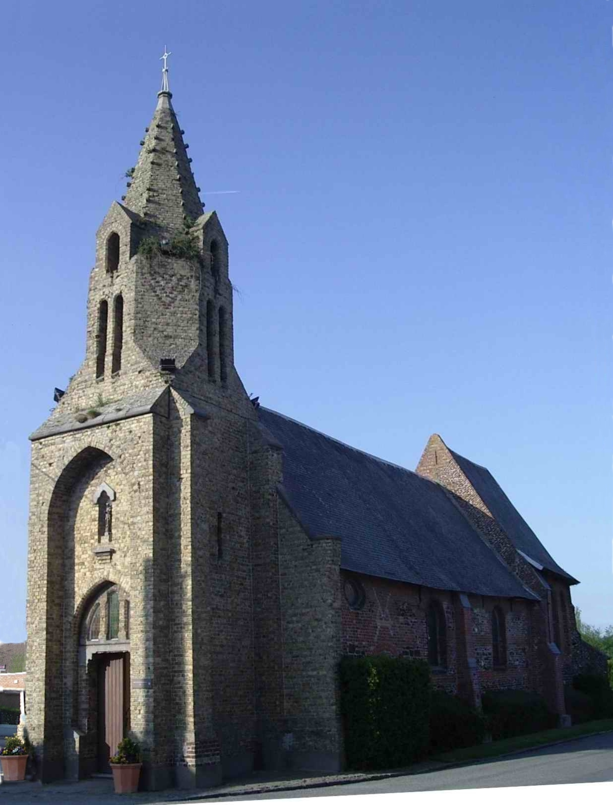 La chapelle de Notre Dame de Grâce et des trois vierges à Caëstre (Nord, France)